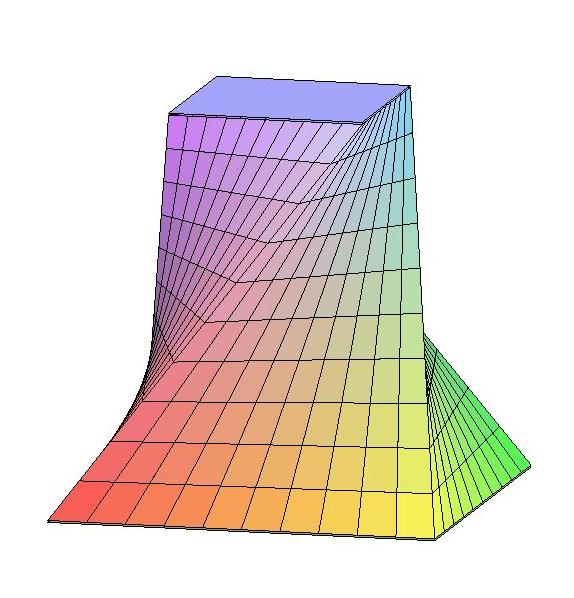 Exemple de tronc de solide, dont les faces latérales sont des paraboloïdes hyperboliques. Le volume de ce solide se calcule par la formule des trois niveaux : V = h/3*(B + b + 4m) où h est la hauteur, B et b les aires des deux bases polygonales parallèles, m, l'aire du polygone se trouvant exactement à mi-hauteur